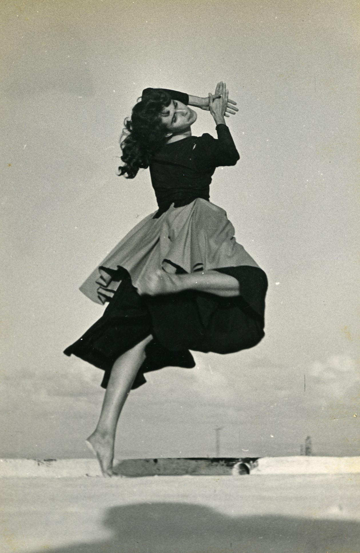 1951 רינה שחם, "אש בהרים", תיארון הבלט הישראלי של גרטרוד קראוס